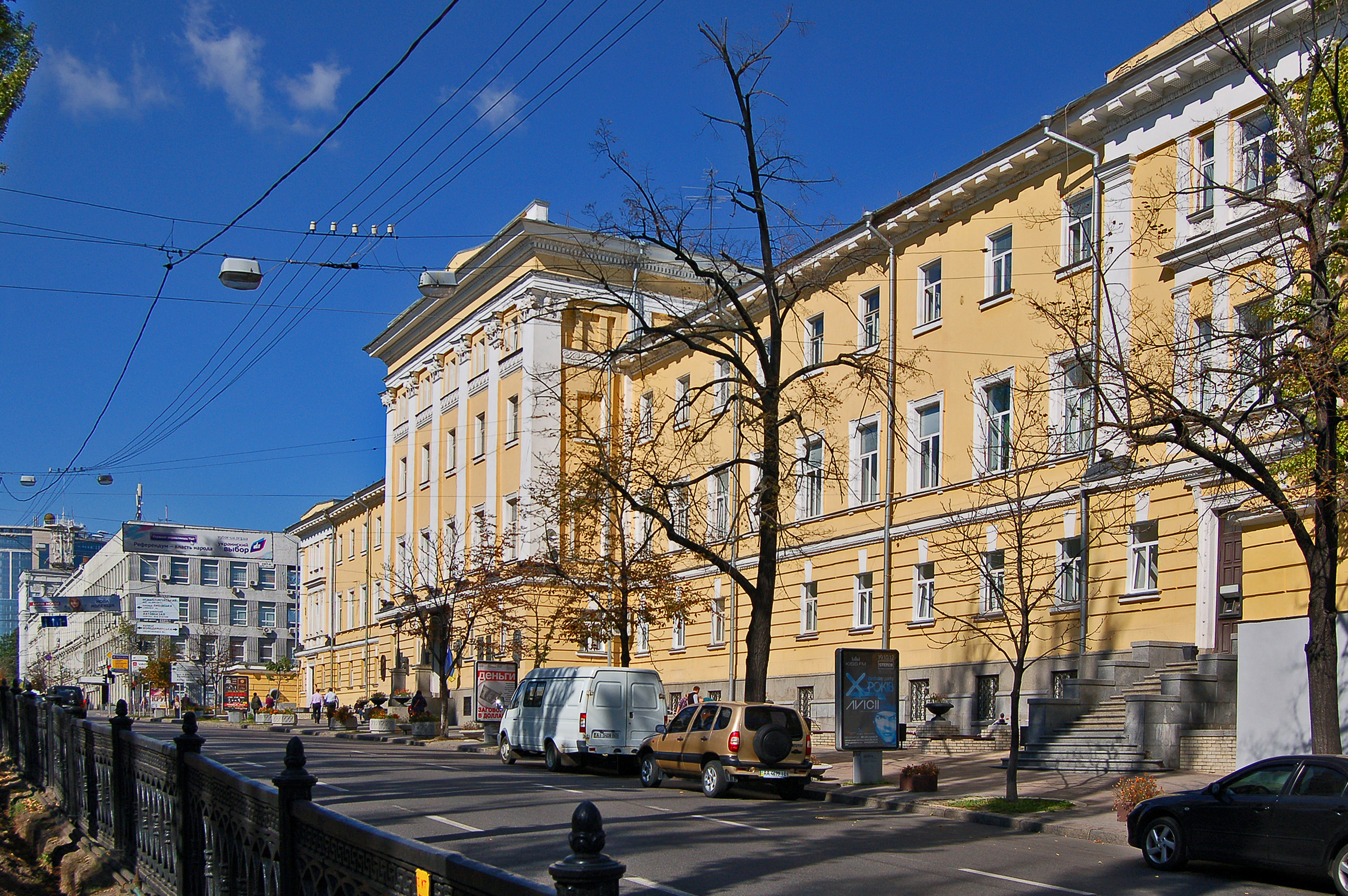 Будинок № 14 по бульвару Тараса Шевченка у Києві